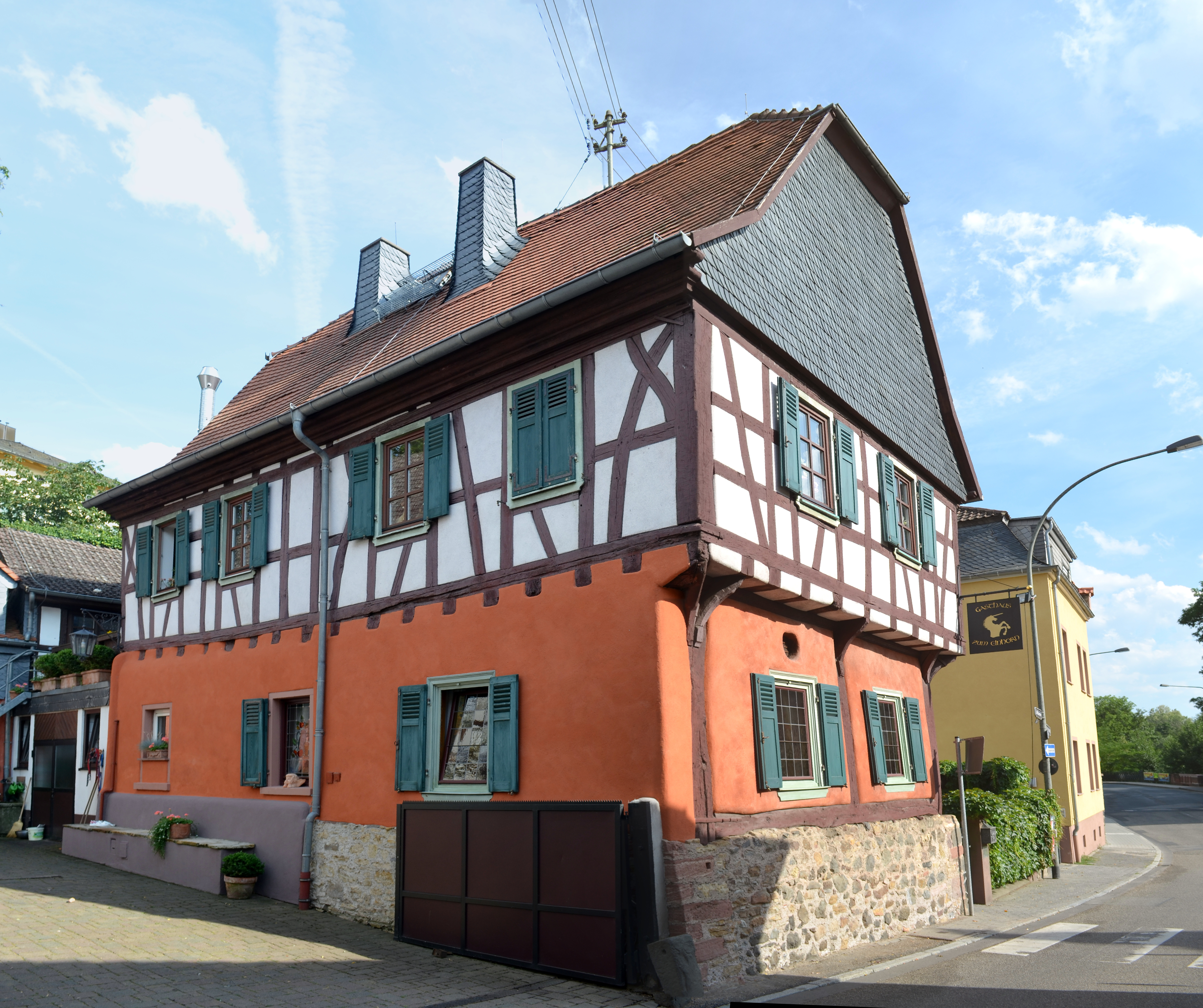 Bonames, Alt Bonames 2